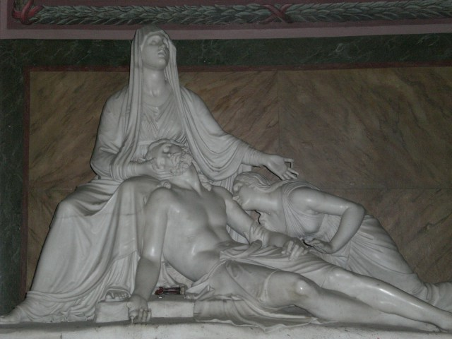 Pietà, modellata dal Canova e scolpita nel marmo dal discepolo Cincinnato Baruzzi, custodita nella chiesa neoclassica del SS. Salvatore.